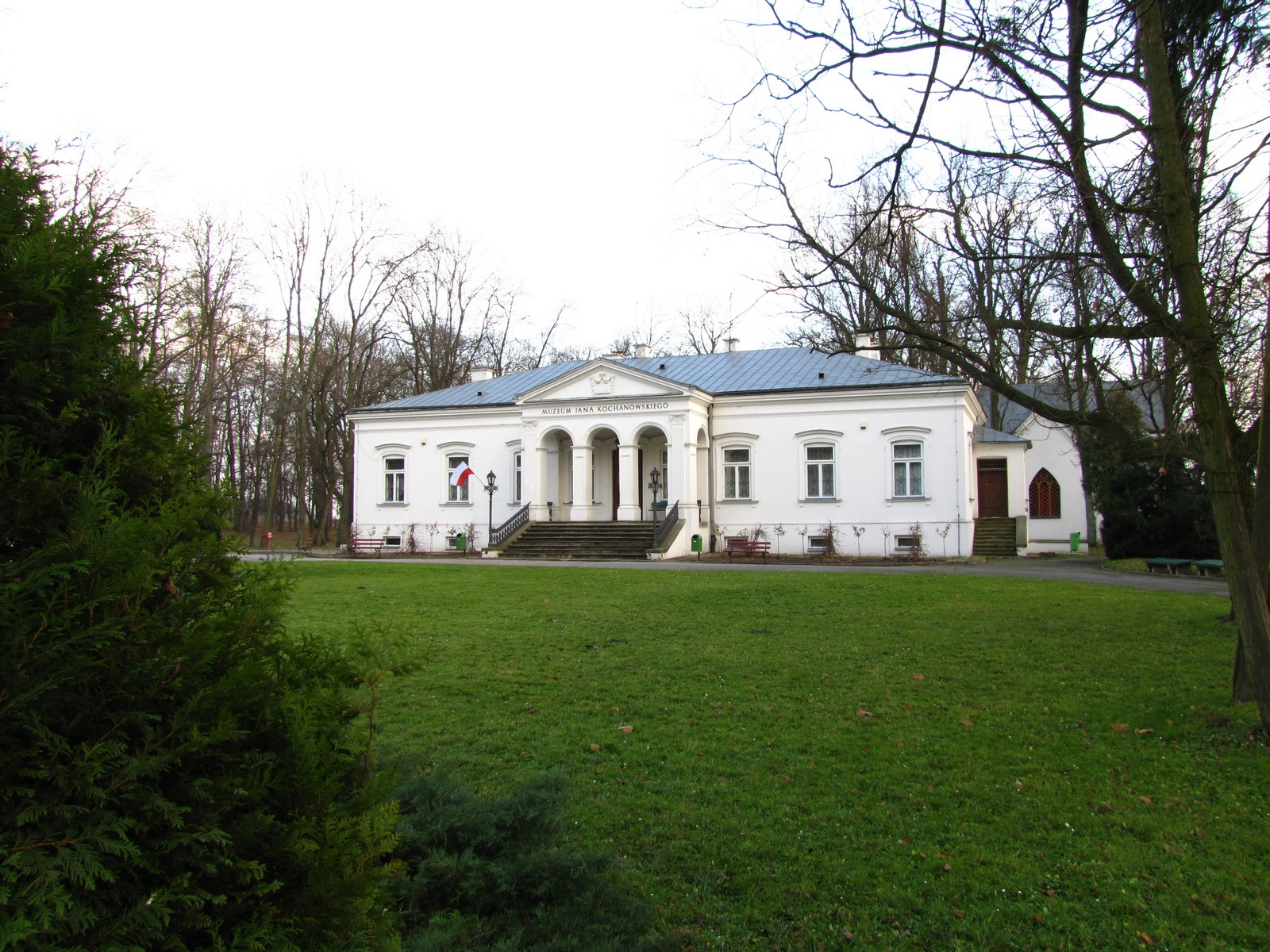 Zespół dworski Czarnolas